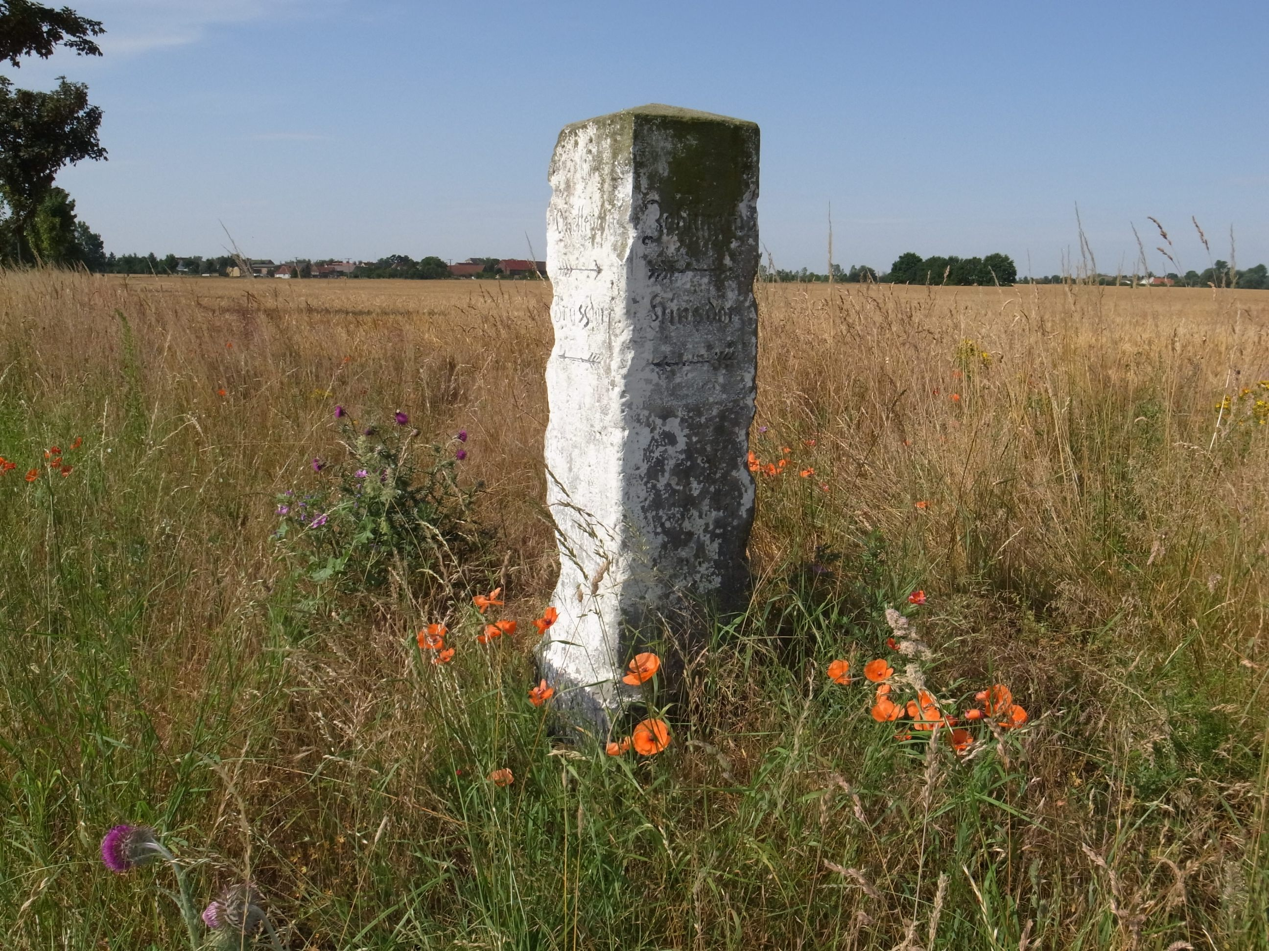 Wegweiser zwischen Quellendorf und Fraßdorf. Inschrift: Quellendorf / Frassdorf ; Zemigkau / Hinsdorf. Maße: Höhe 152 cm / Oben 34x34 cm / Sockel 40x40 cm